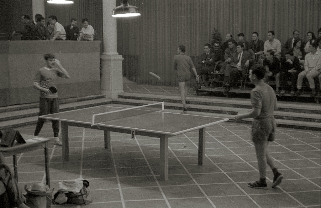 Título original: Celebración de un campeonato de tenis de mesa en unos salones (1/2) Localización: San Sebastián (Guipúzcoa)